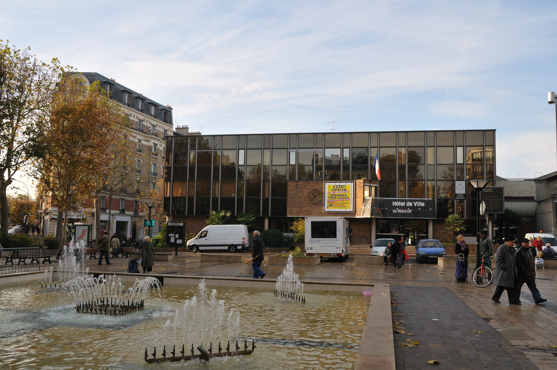 Place du 11 Novembre, Malakoff, Hauts-de-Seine, France